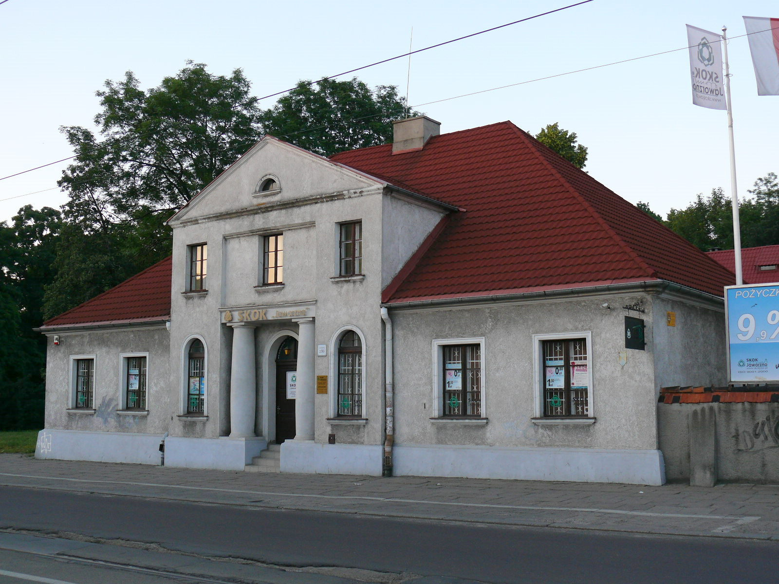 Dworek Ludwika Geyera przy ulicy Piotrkowskiej 286 w Łodzi